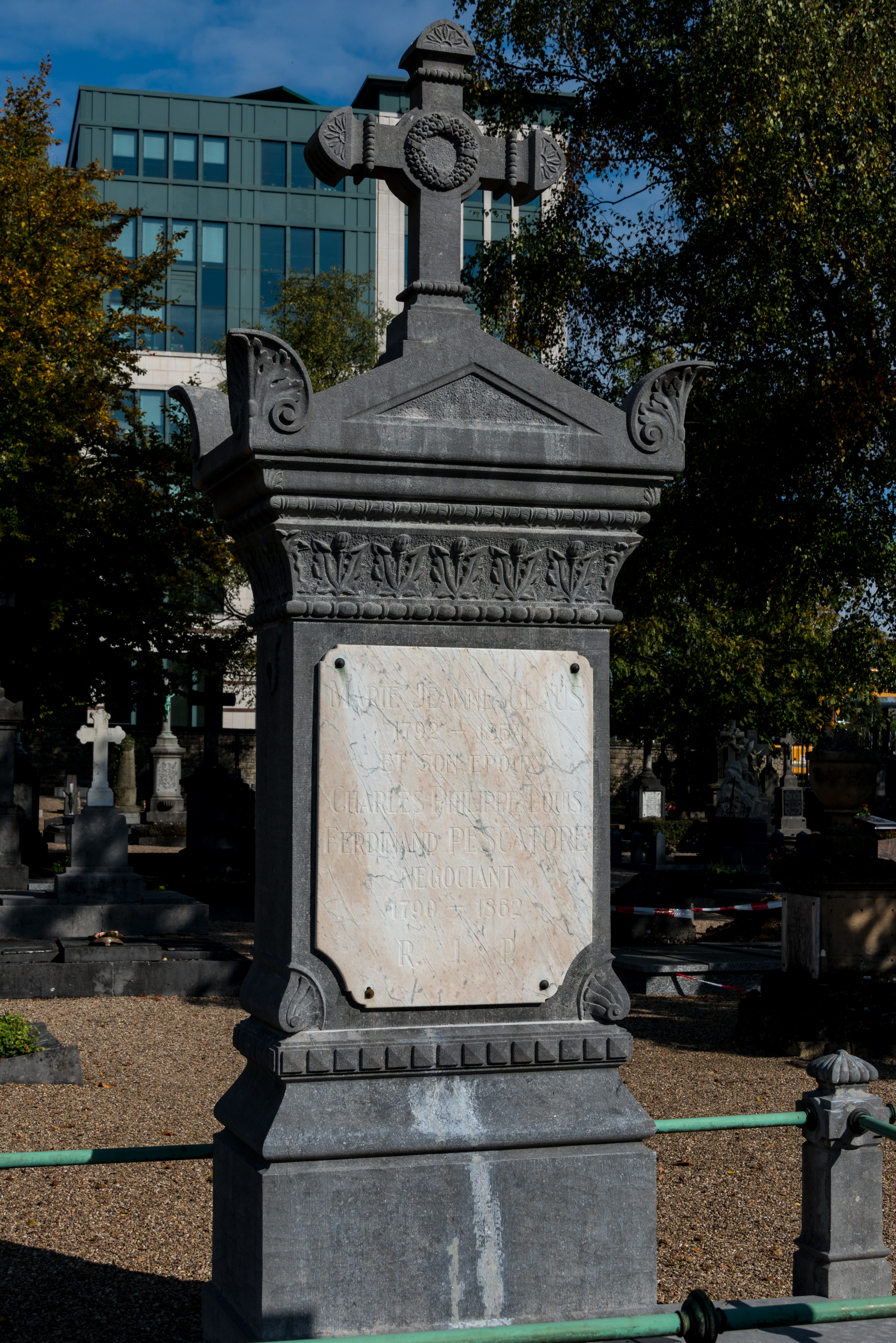 Graf Ferdinand Pescatore um Nikloskierfecht.